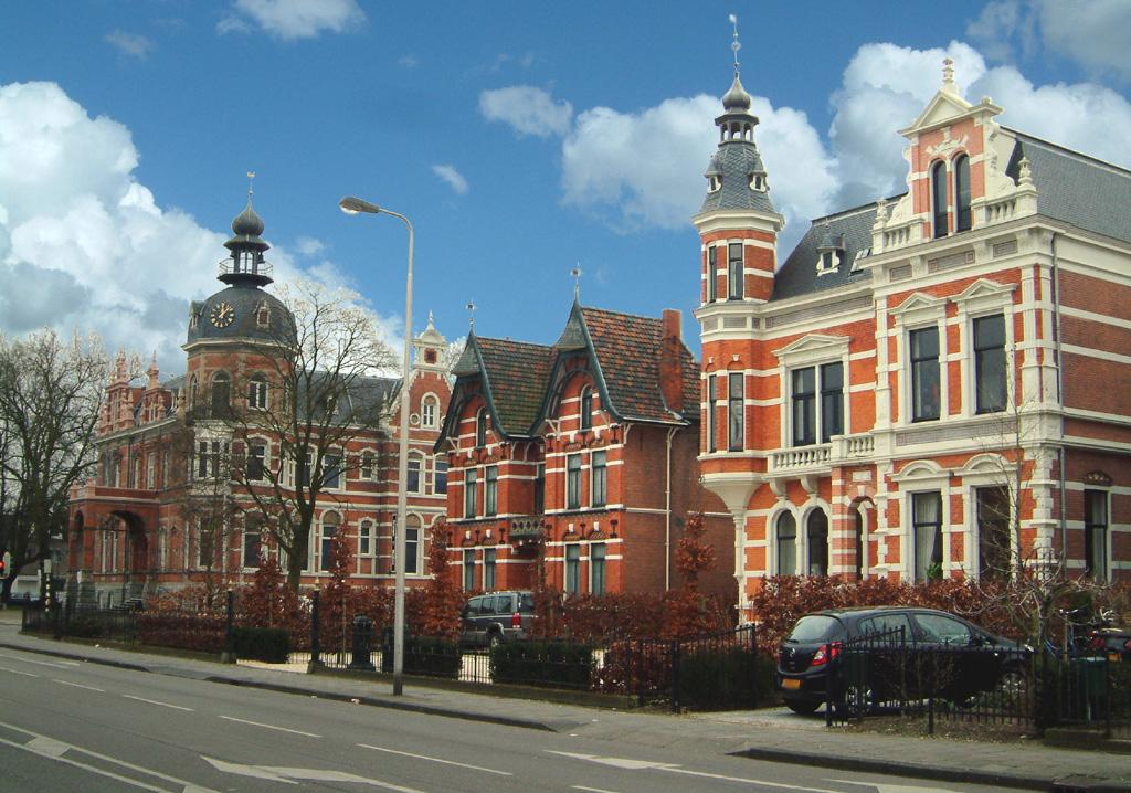 Molenstraat Oss